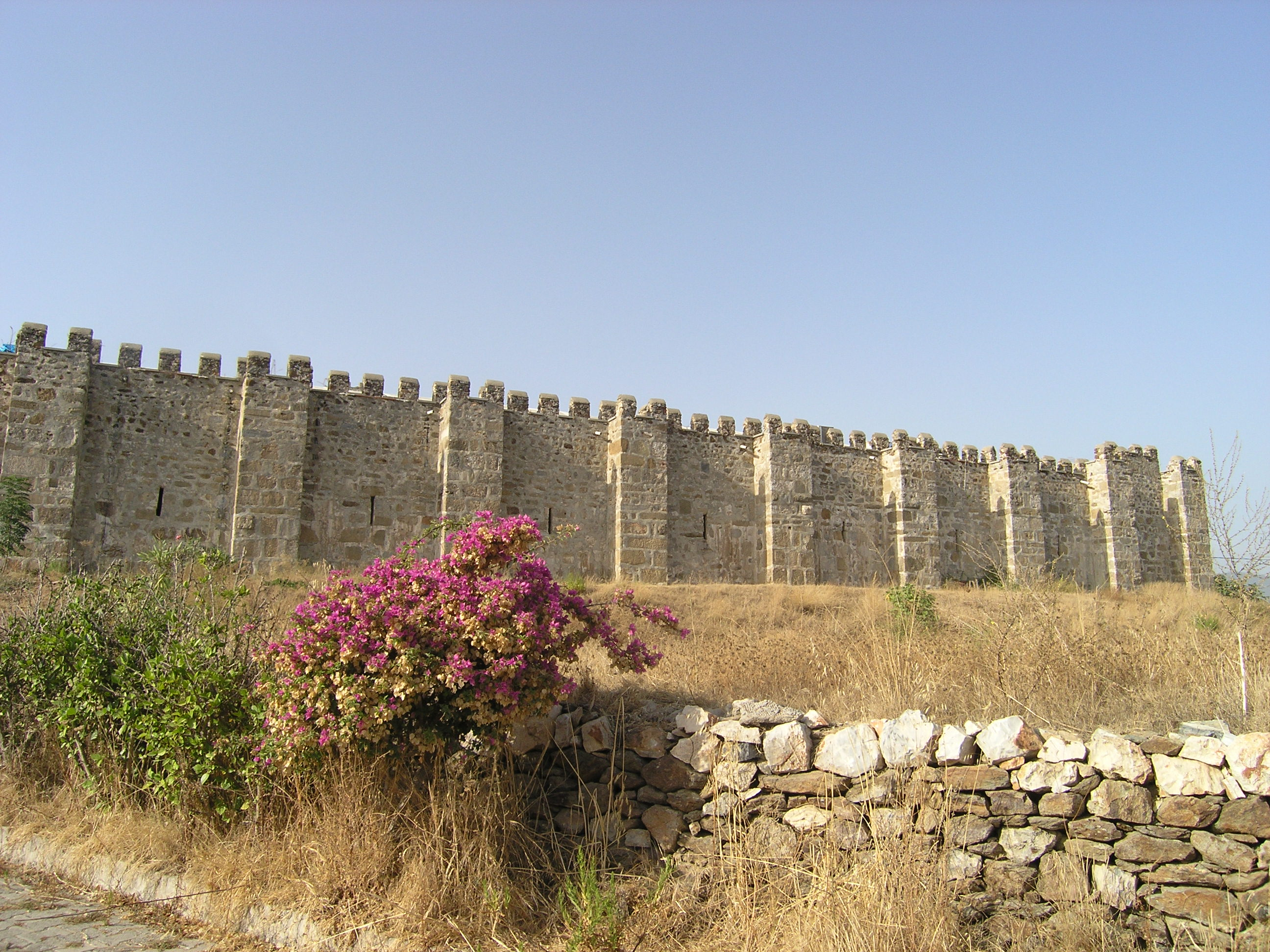 Șarapsa Han ist eine Karawanserei im Süden der Türkei. Ansicht der Südseite.